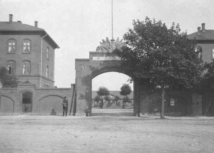 Artillerivejens Kaserne i København